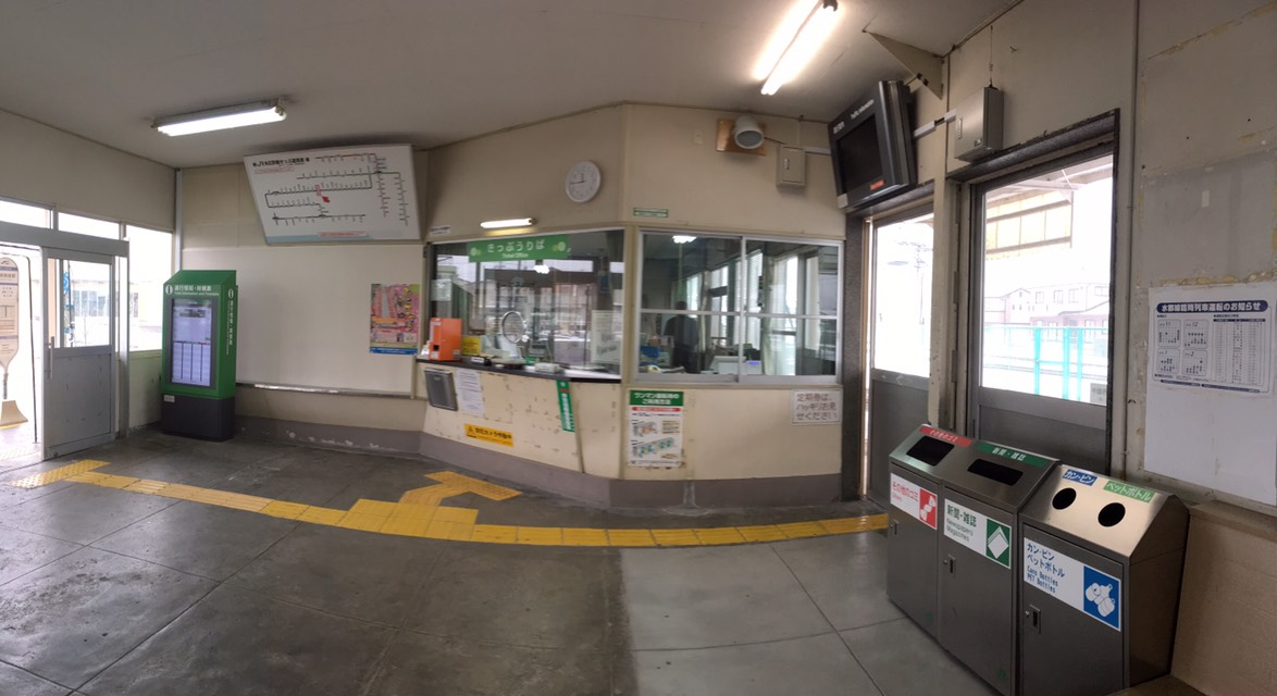 磐城棚倉駅の構内の様子です。